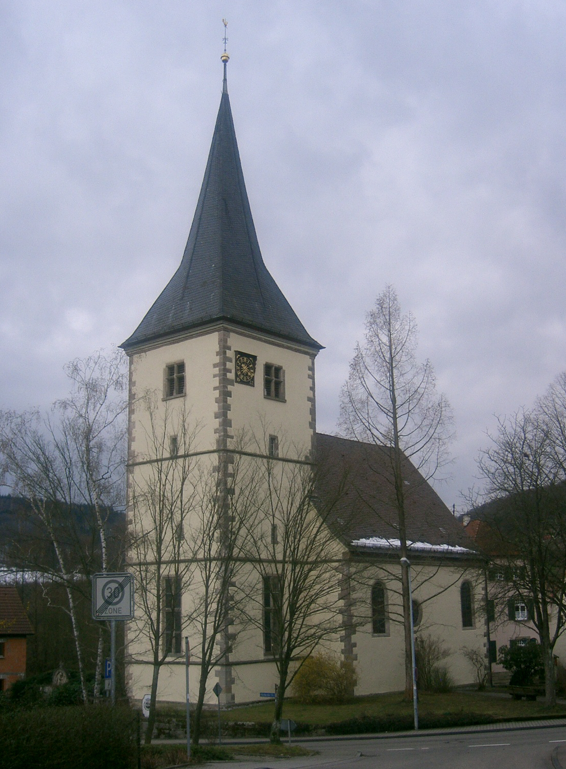 Die evangelische Kirche in Pfedelbach-Untersteinbach